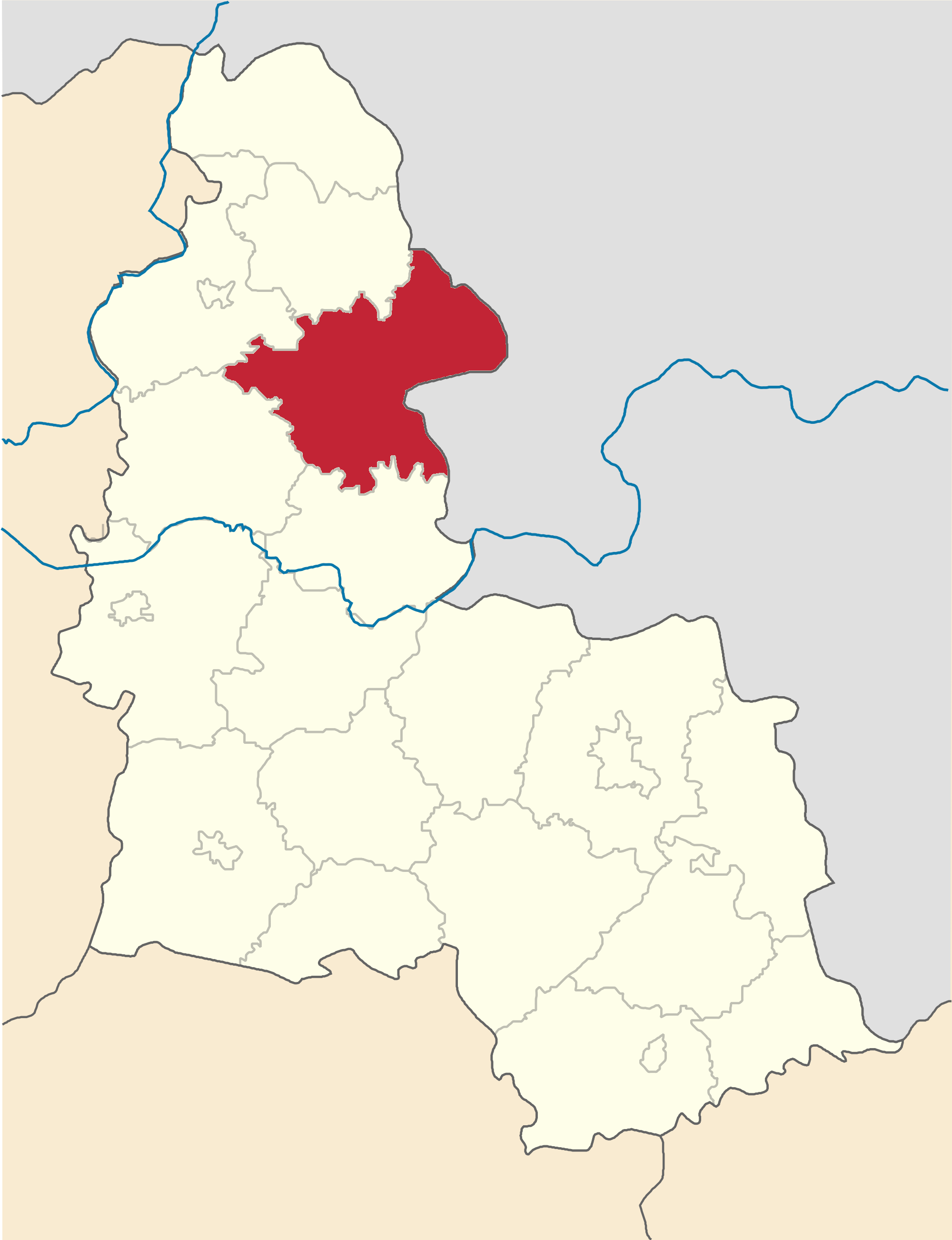 Gluhivskyi-Raion map